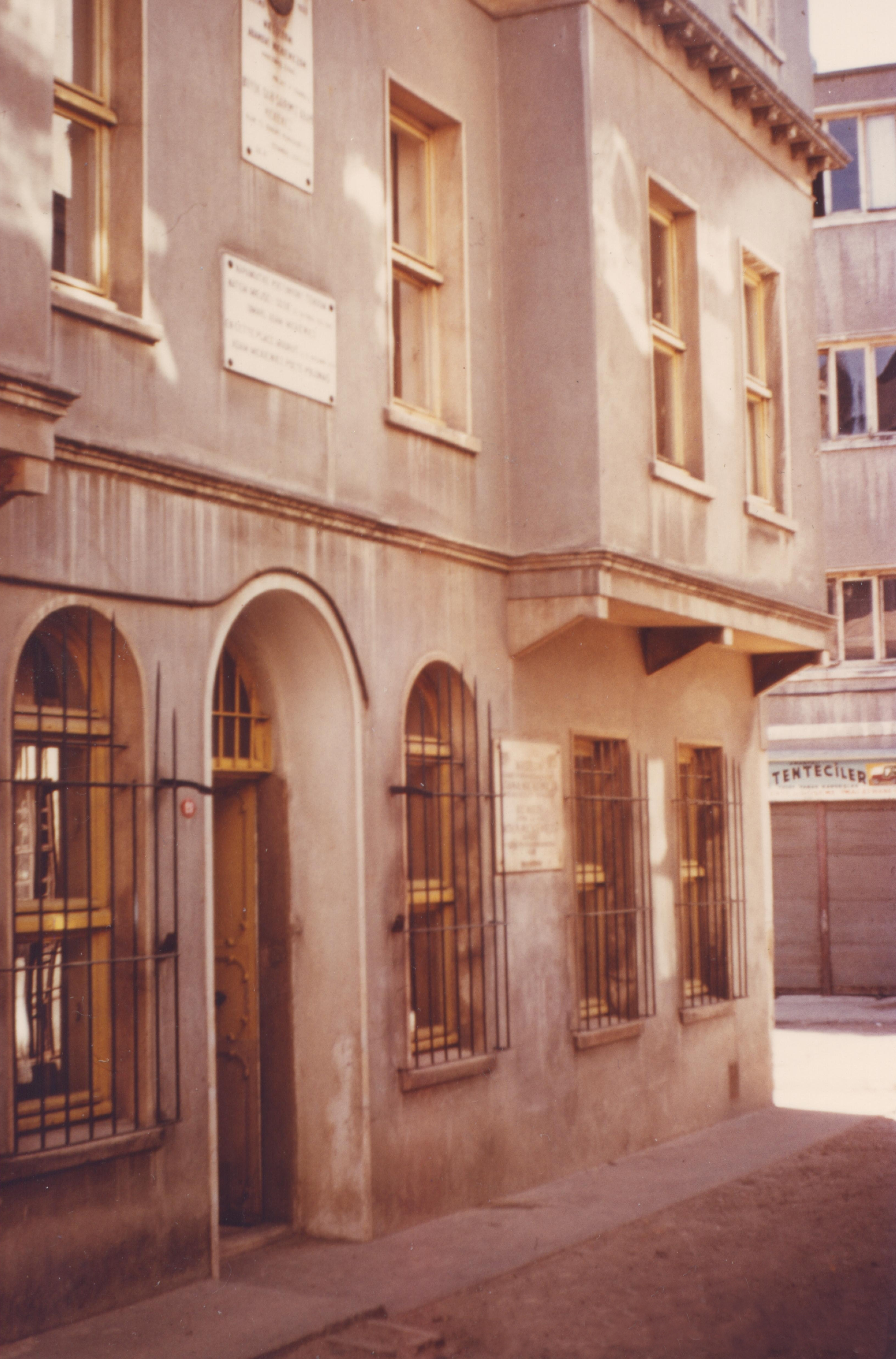 C'est en cet endroit qu'est décédé Adam Mickiewicz en 1855.